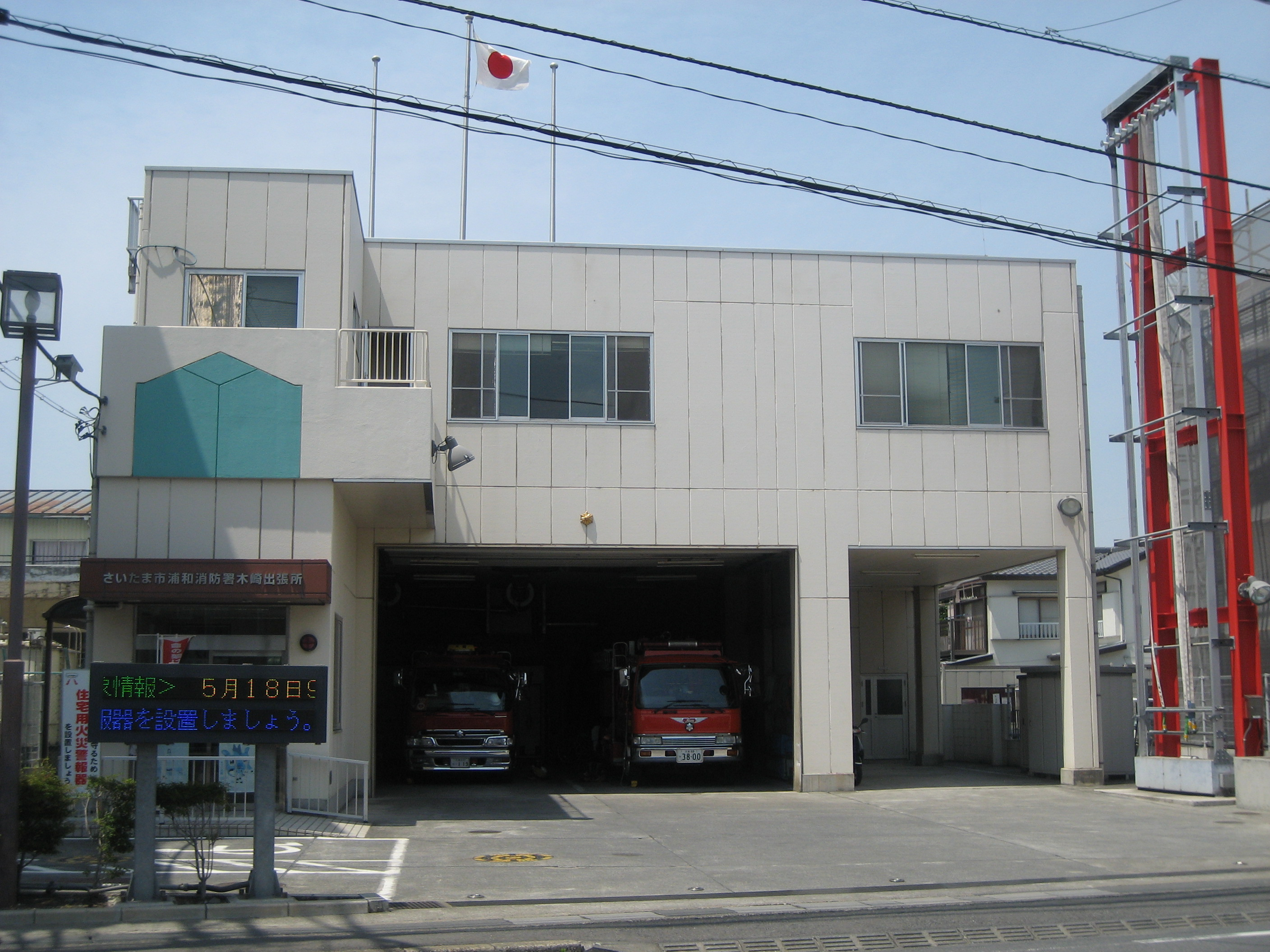 さいたま市消防局浦和消防署木崎出張所①